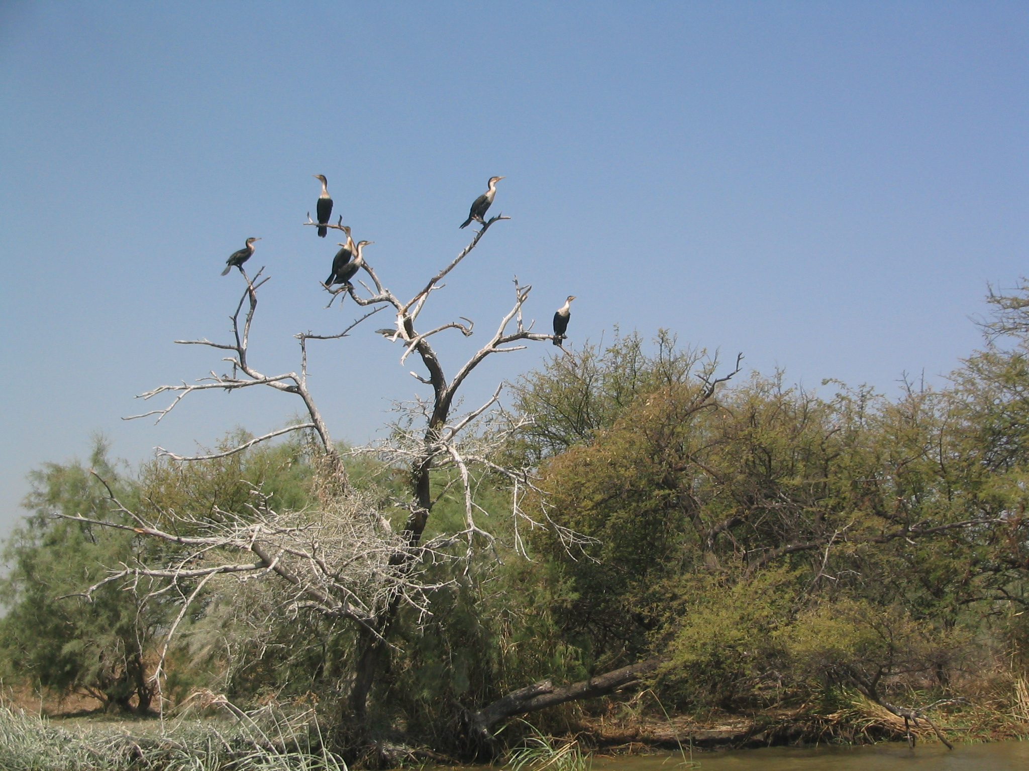 Cormorans (Phalacrocorax carbo maroccanus) au Parc National du Djoudj (Sénégal)